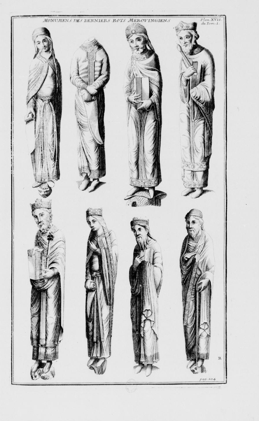 Statues du portail central de l'abbatiale de Saint-Denis --- dessin de Bernard de Montfaucon, Les monumens de la monarchie françoise, VOL1.